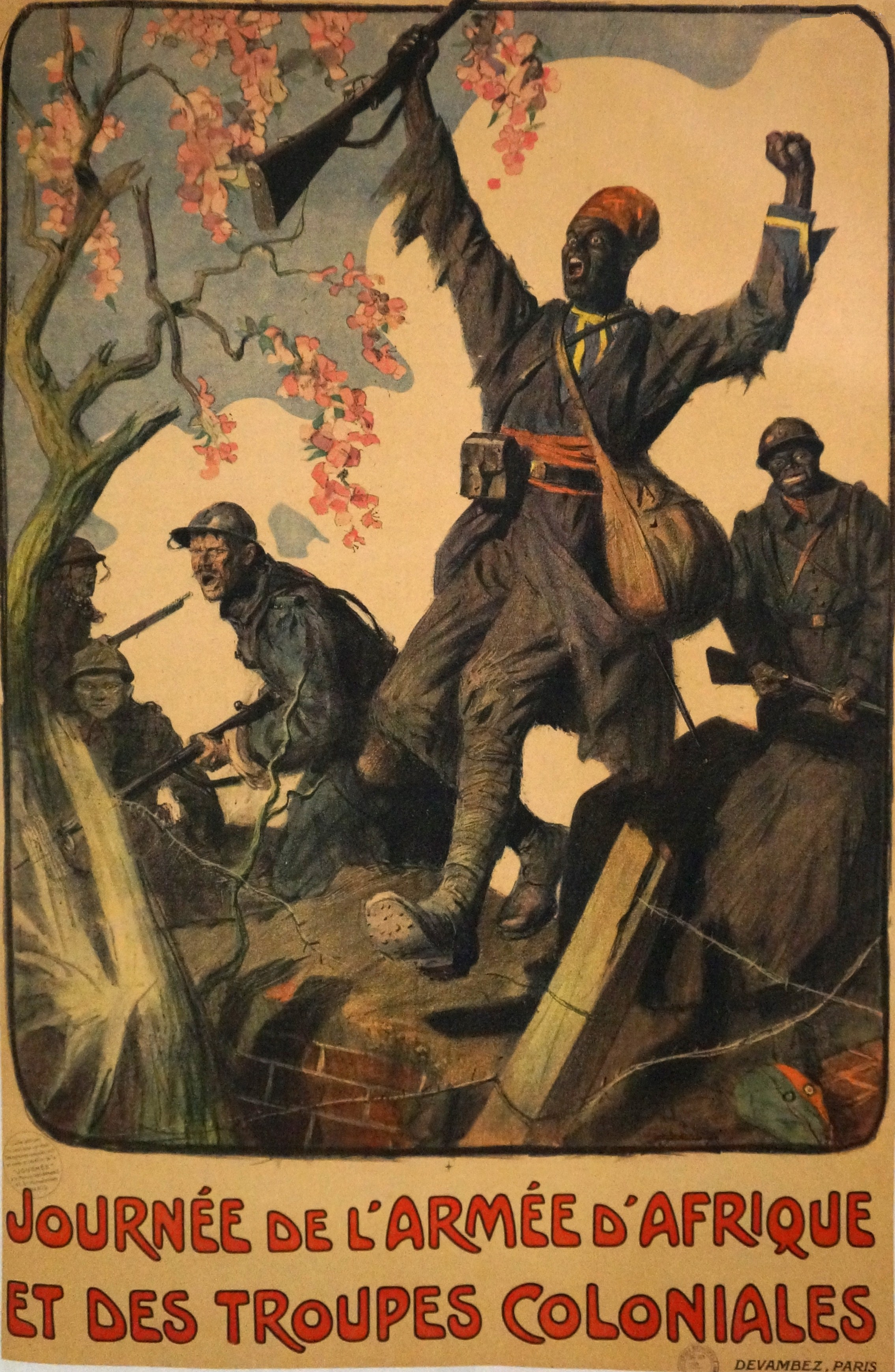 Lors de l'exposition Vitry ville hôpital 1914 2014. Publiée avec l'aimable autorisation du Maire.